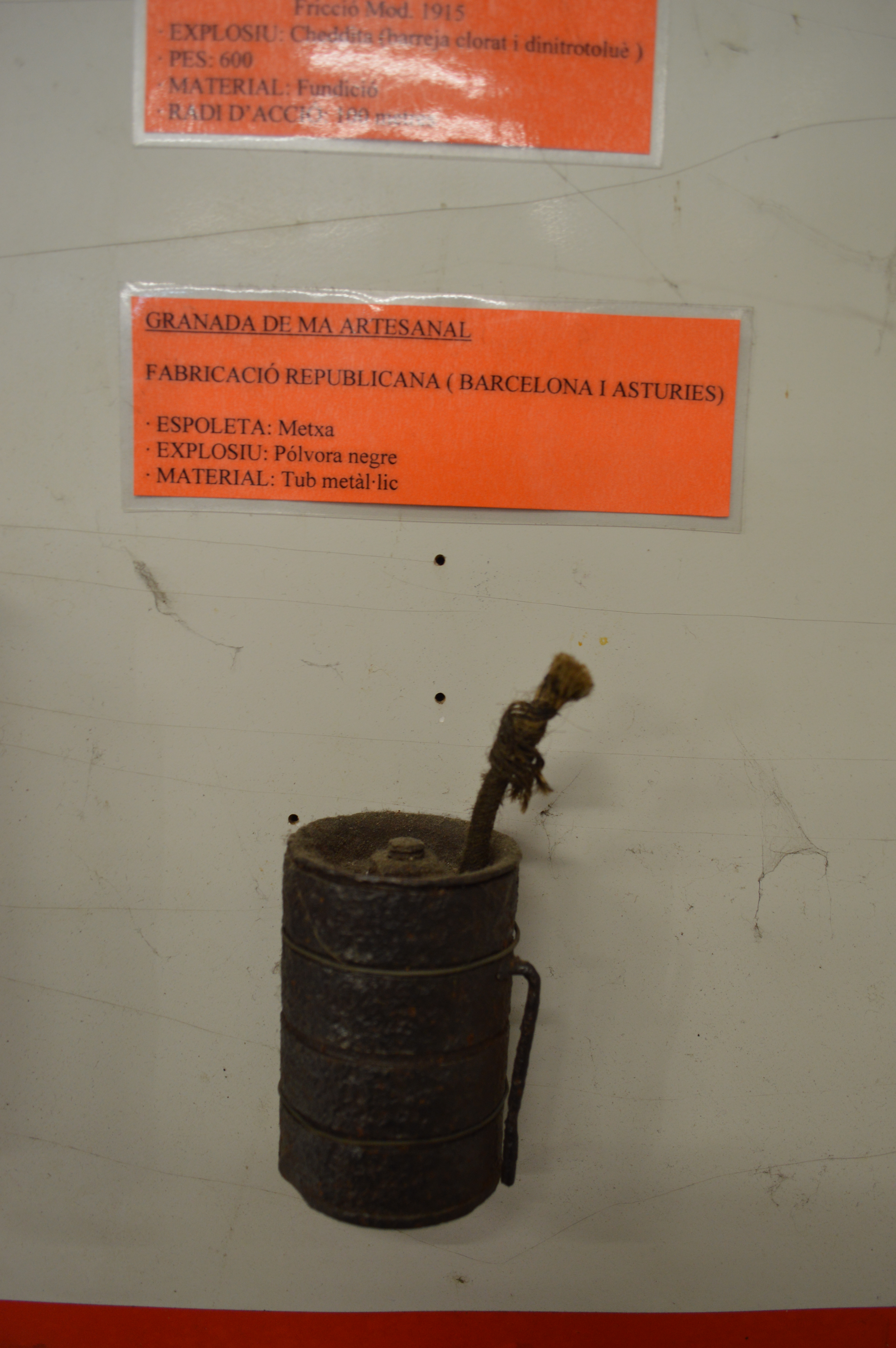 Bomba de mà artesanal possiblement fabricada a Catalunya amb explosiu fet de pólvora negra i accionament per metxa.